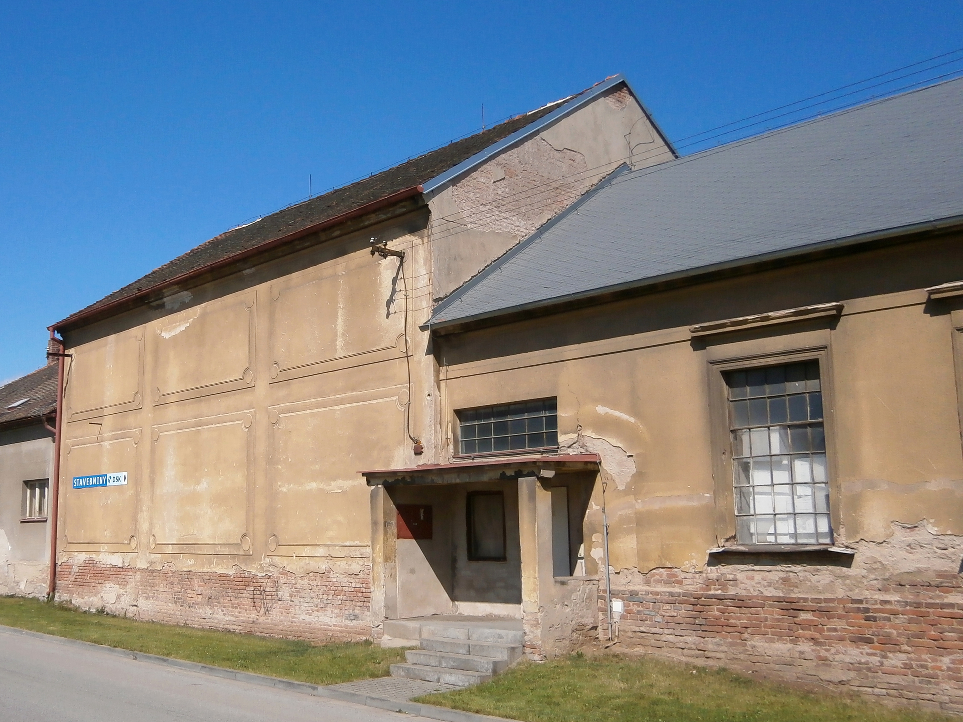 Budovy areálu bývalých ústředních jatek v Hradci Králové